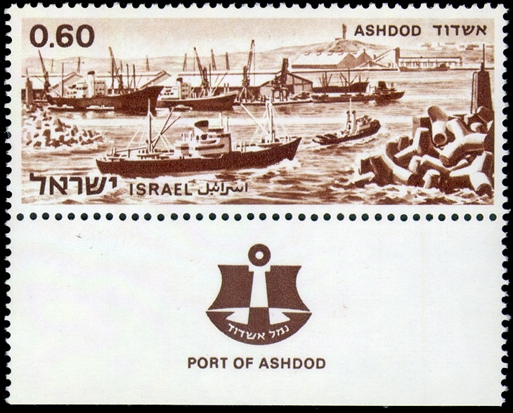 בול נמל אשדוד